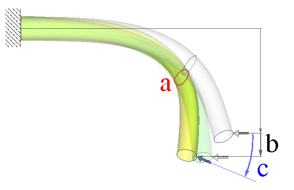 Deformation eines Rohres (von grau nach gelb): a) Verformung des Querschnitts ändert die Steifigkeit (rot) b) Auslenkung ändert die Steifigkeit c) Deformation ändert Kraftrichtung (blau), grün angedeutet: lineare Rechnung